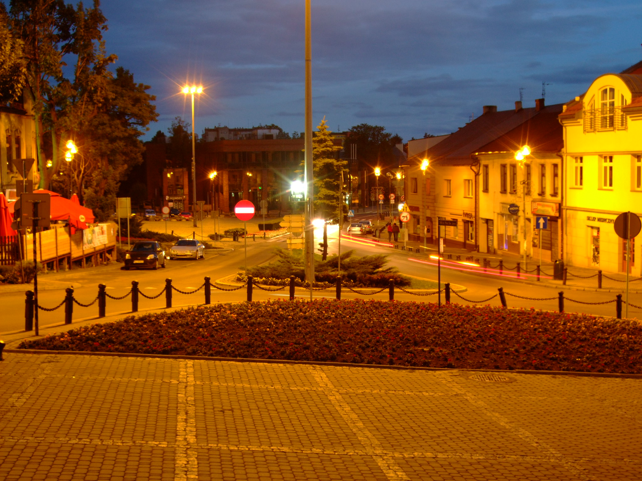 Rynek w Jaworznie.